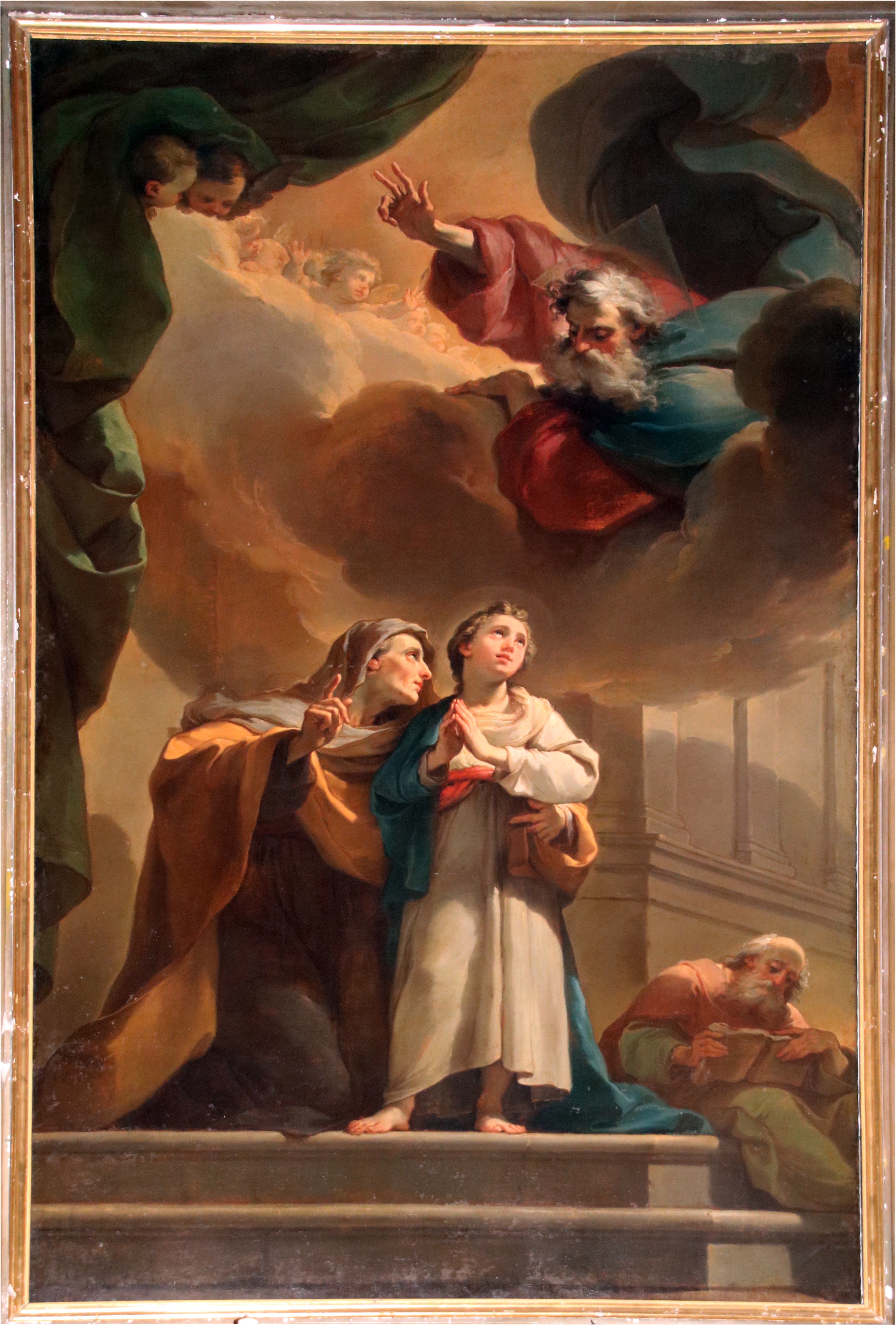 Ubaldo Gandolfi, La Vergine con i Ss. Anna e Gioacchino, Collegiata San Giovanni Battista (San Giovanni in Persiceto)